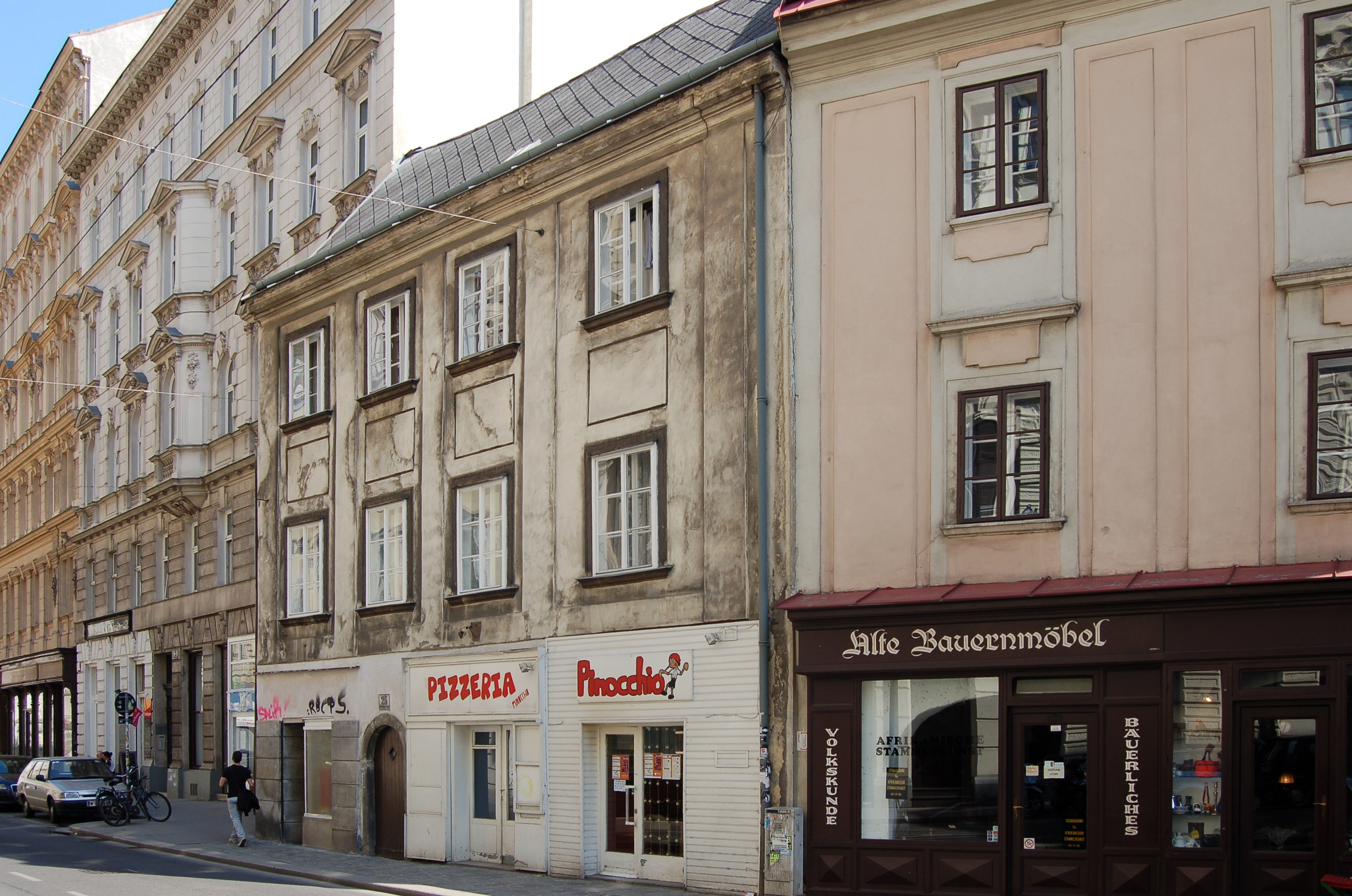 Das denkmalgeschützte Miethaus "Zum grünen Kleeblatt" in der Neustiftgasse 25 in Wien-Neubau (in dem unter anderem Adolph Johannes Fischer während seines Studiums in Wien gewohnt sowie mit seinen Studienkollegen Felix Braun und Franz Theodor Csokor diskutiert, gelesen und musiziert hat).